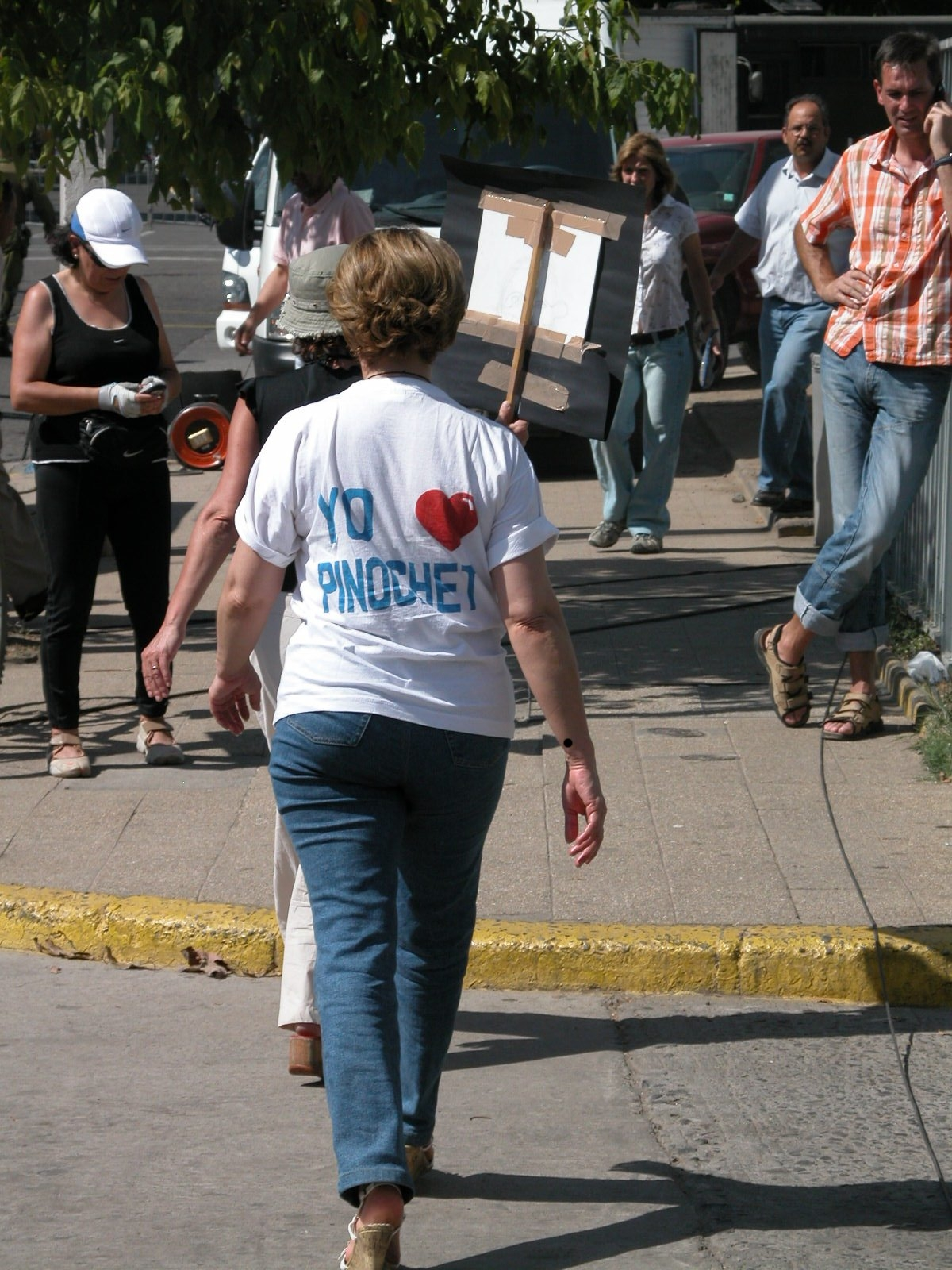 Et oui qd on aime...